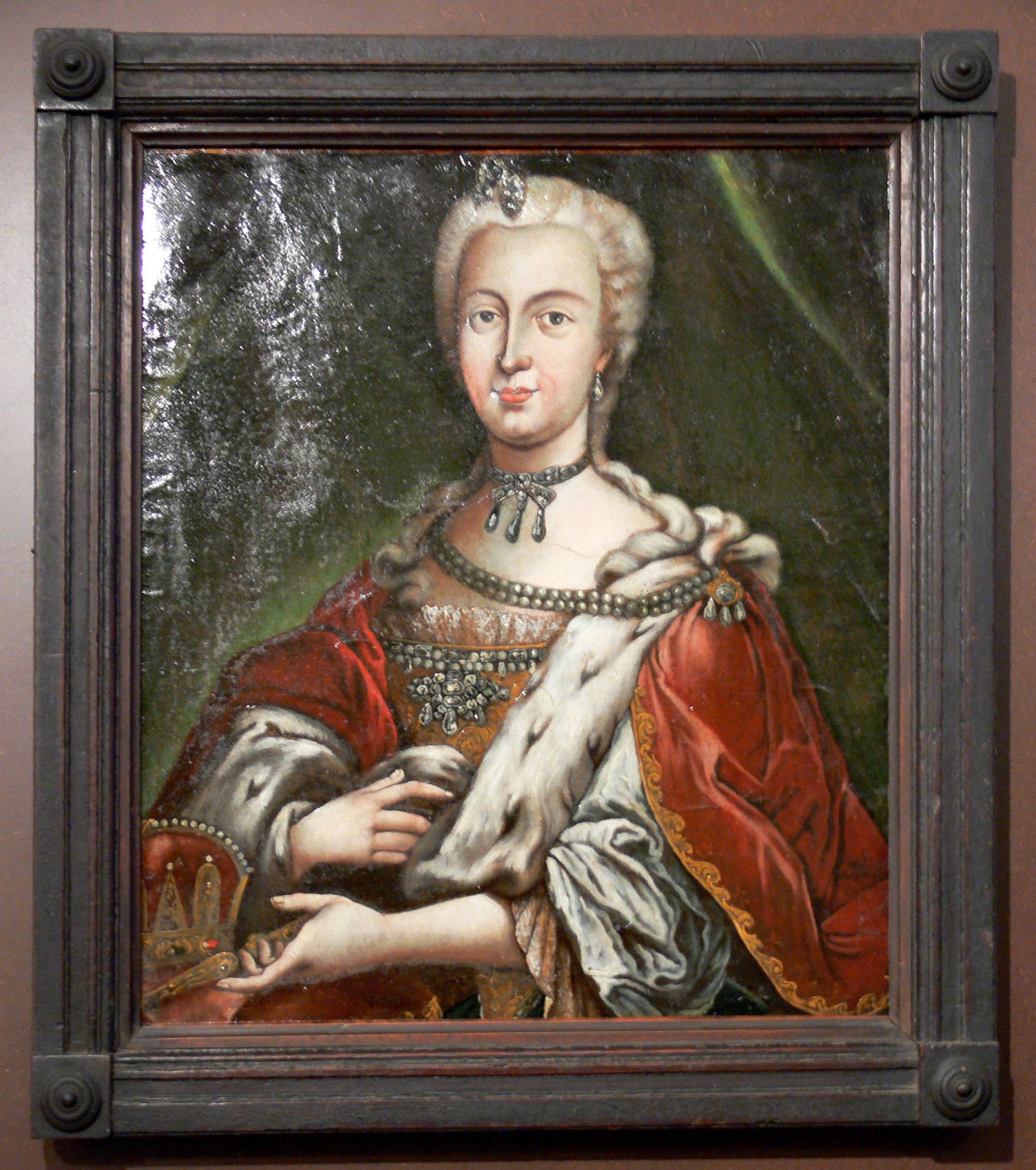 Maria Theresia mit der Stephanskrone, Öl auf Leinwand, wohl Ungarn um 1740